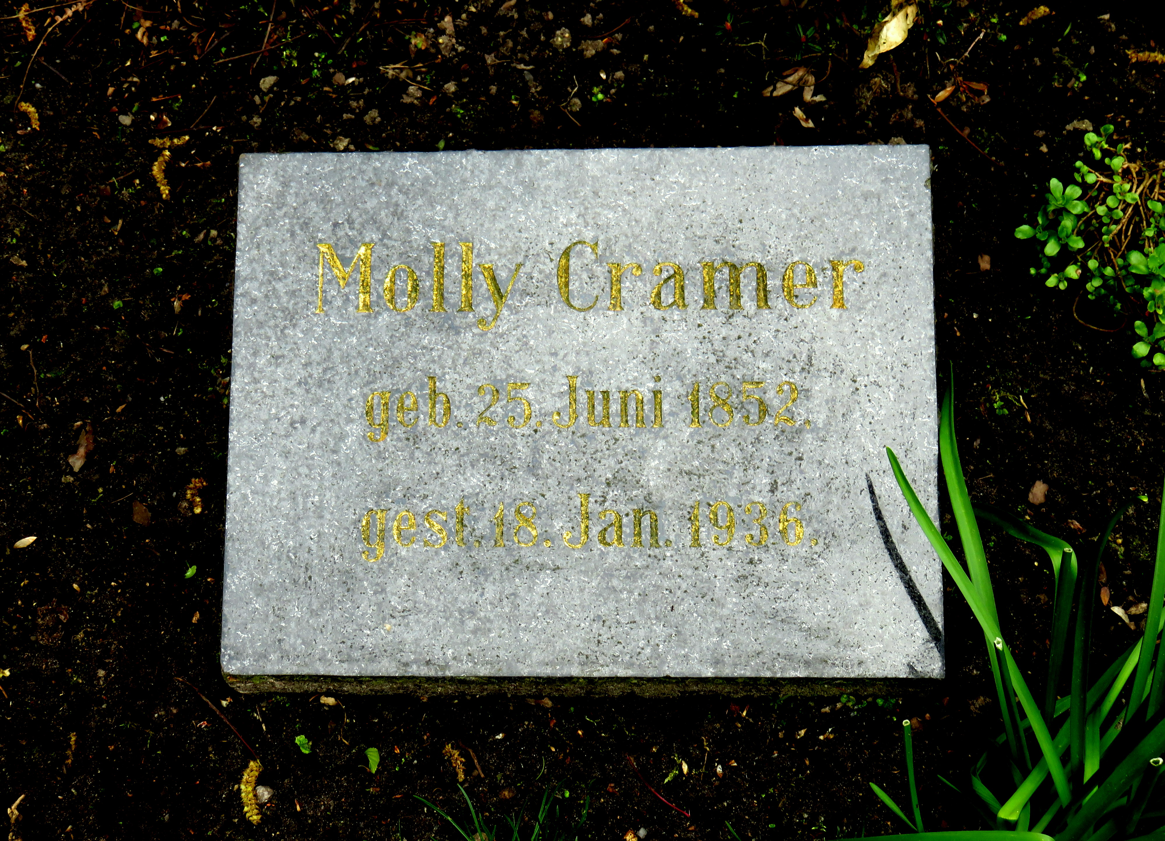 Historischer Grabstein der deutschen Kunstmalerin Molly Cramer im Bereich des Gartens der Frauen auf dem Ohlsdorfer Friedhof in Hamburg-Ohlsdorf.